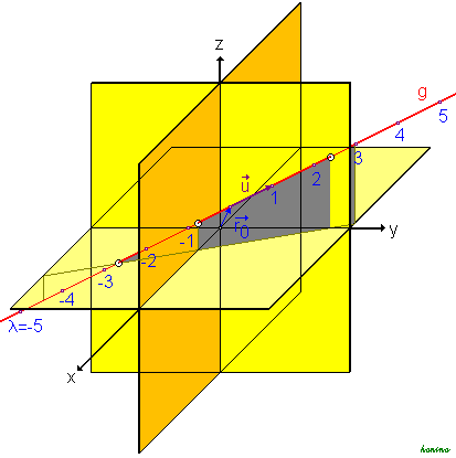 Parameterform einer Geraden im Raum